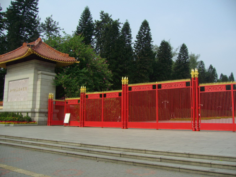 烈士陵园正门